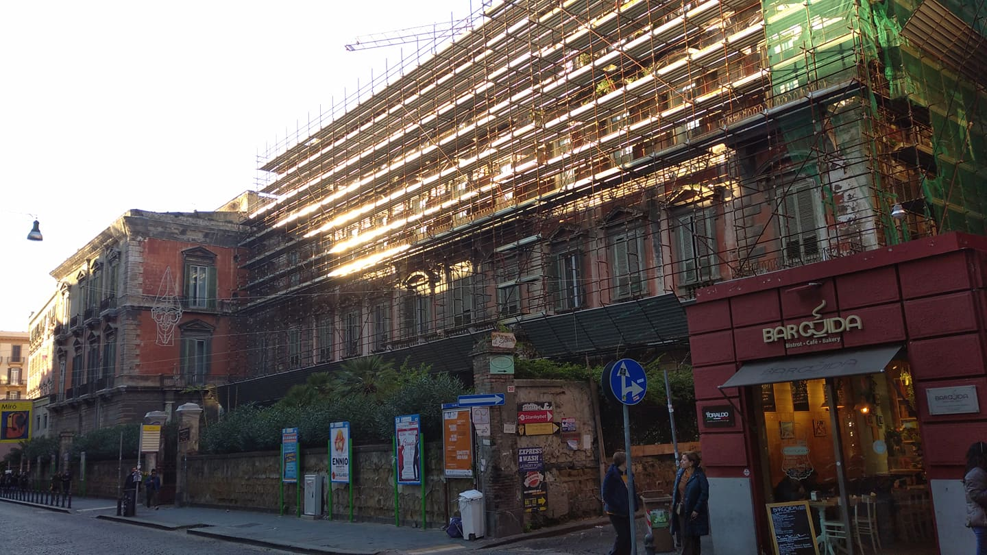 Palazzo d'Avalos del Vasto - Palazzo monumentale in via dei Mille (Napoli)